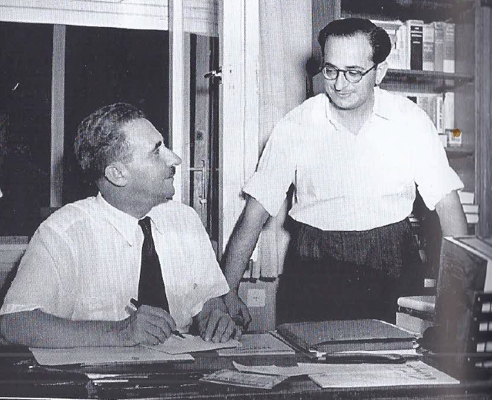 משה שרת עם יצחק נבון במשרדו בירושלים